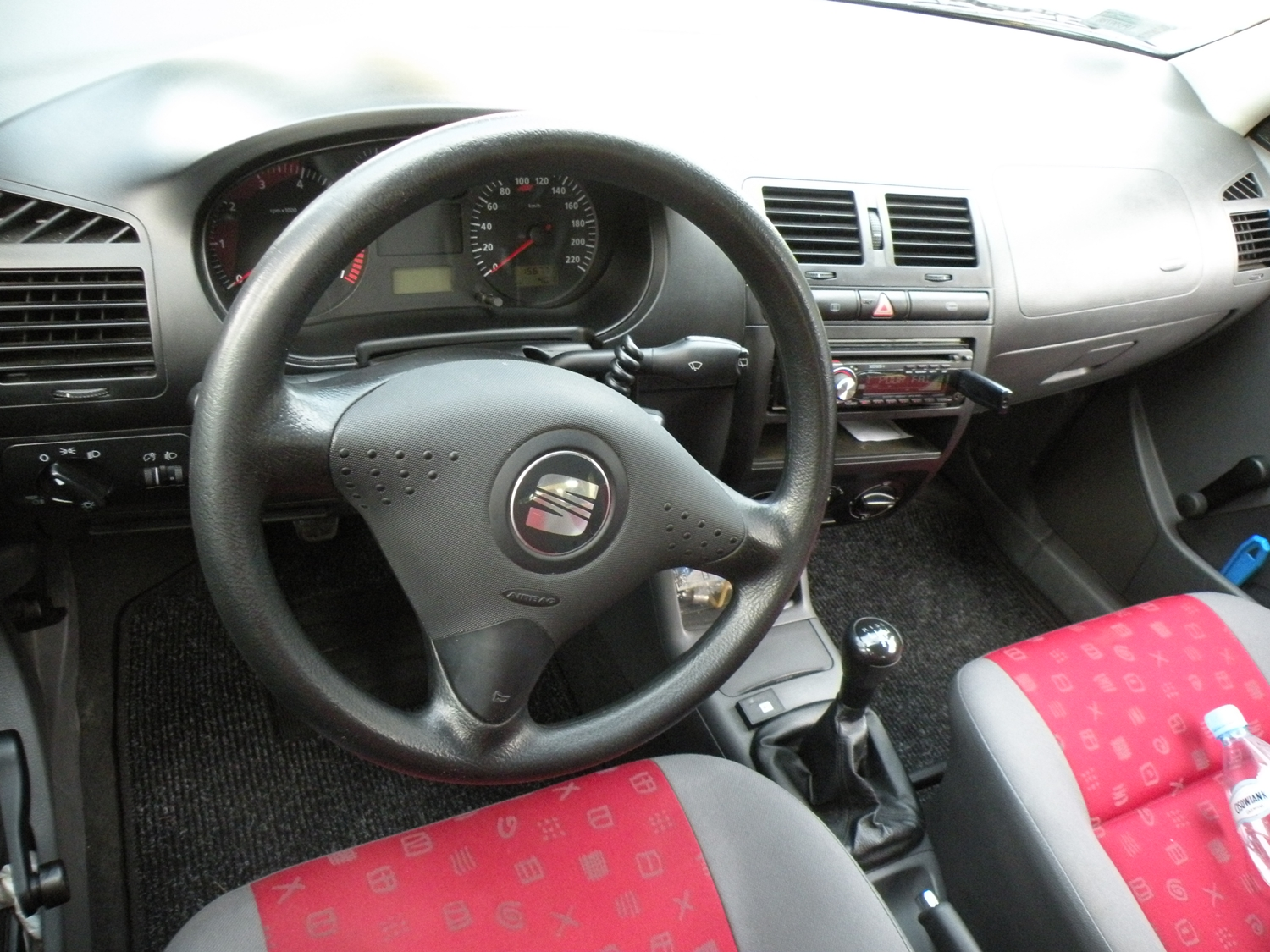 SEAT Ibiza Mk2 fl interior